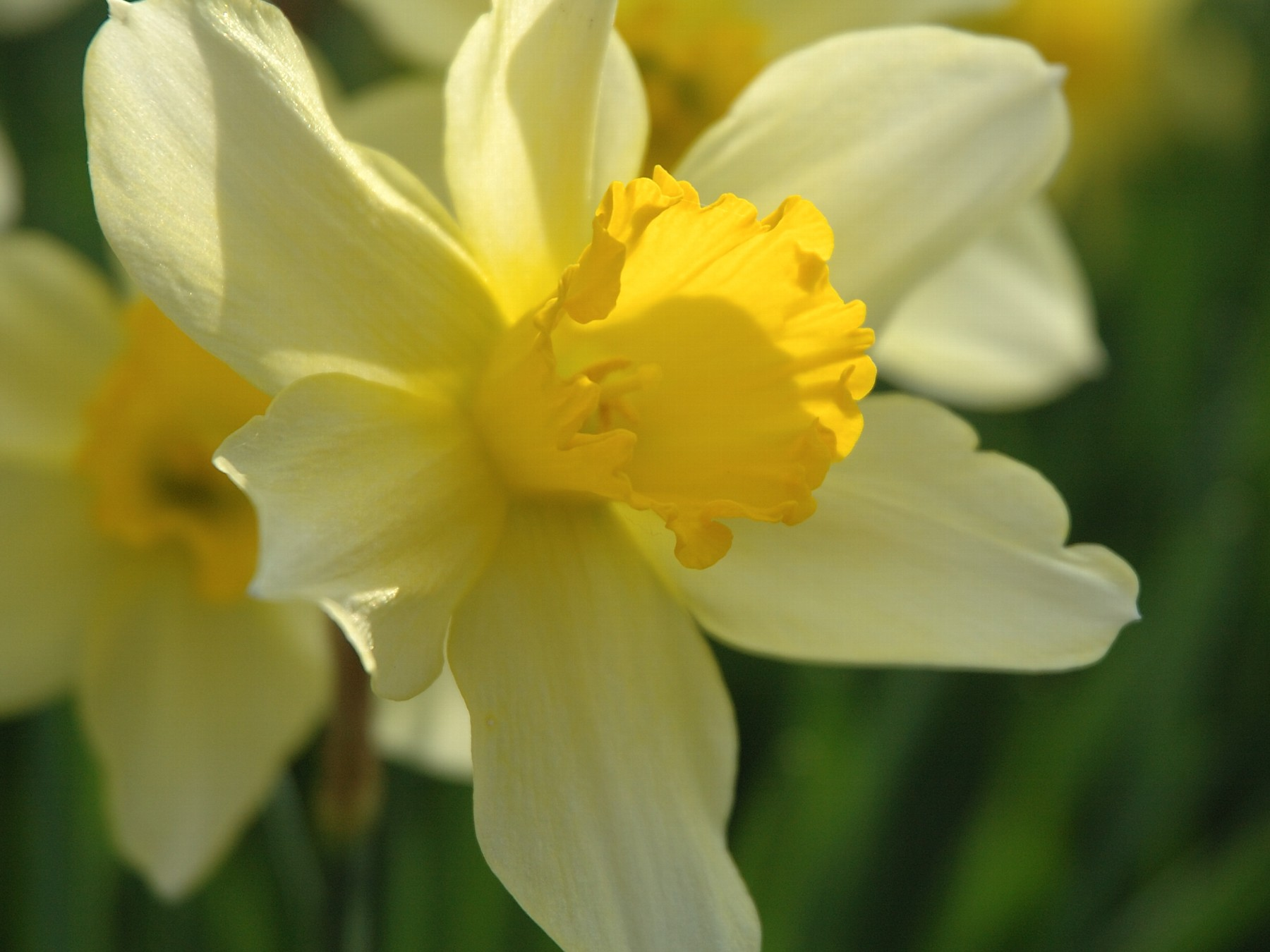 Narcissus (Narcissi,スイセン)